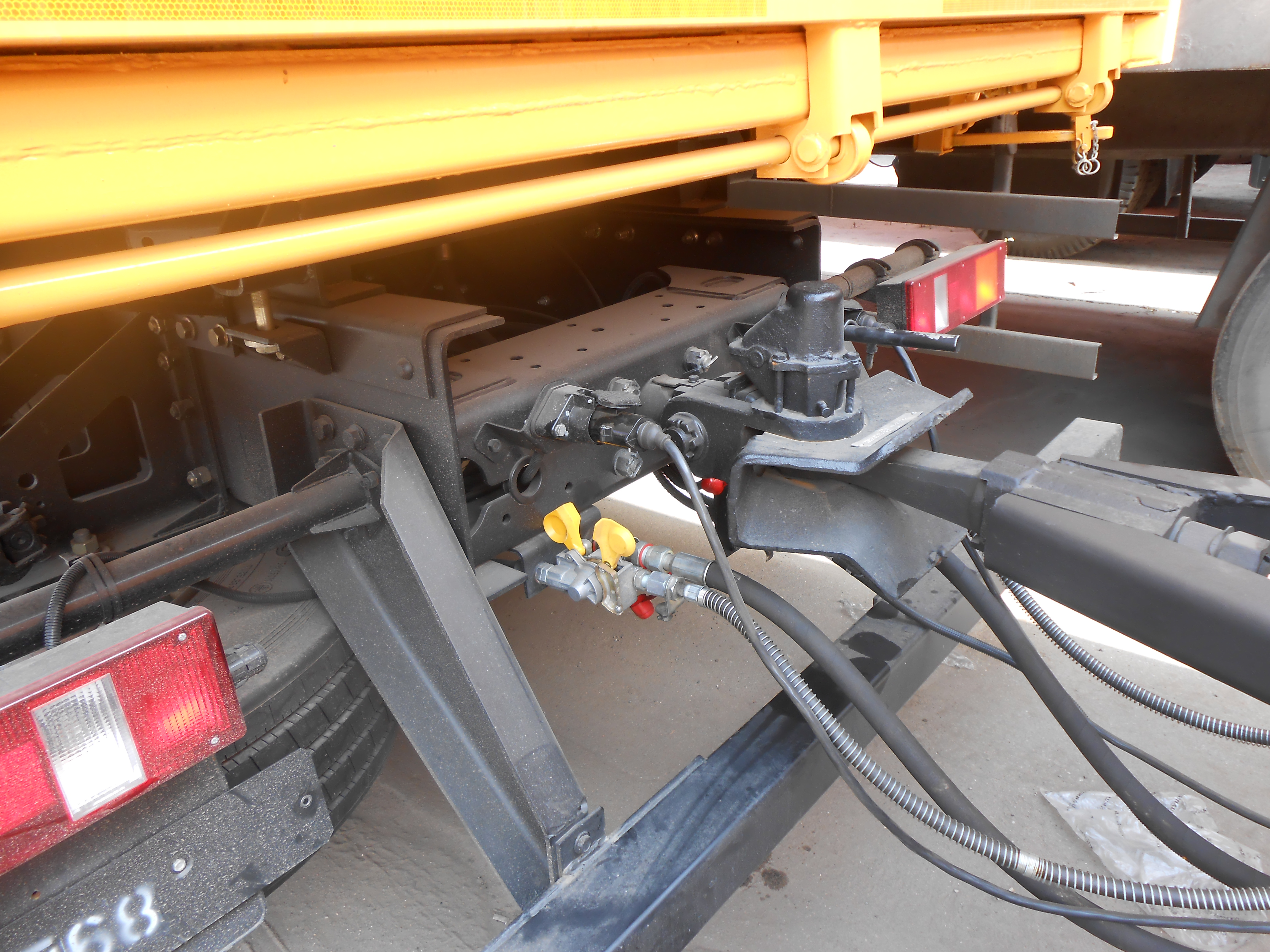 простая и удобная